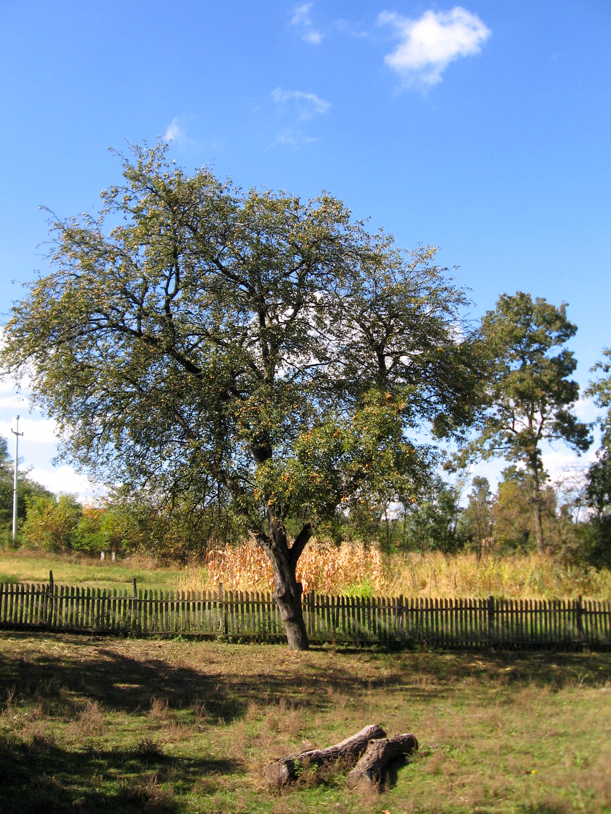 Drvo u Beljini